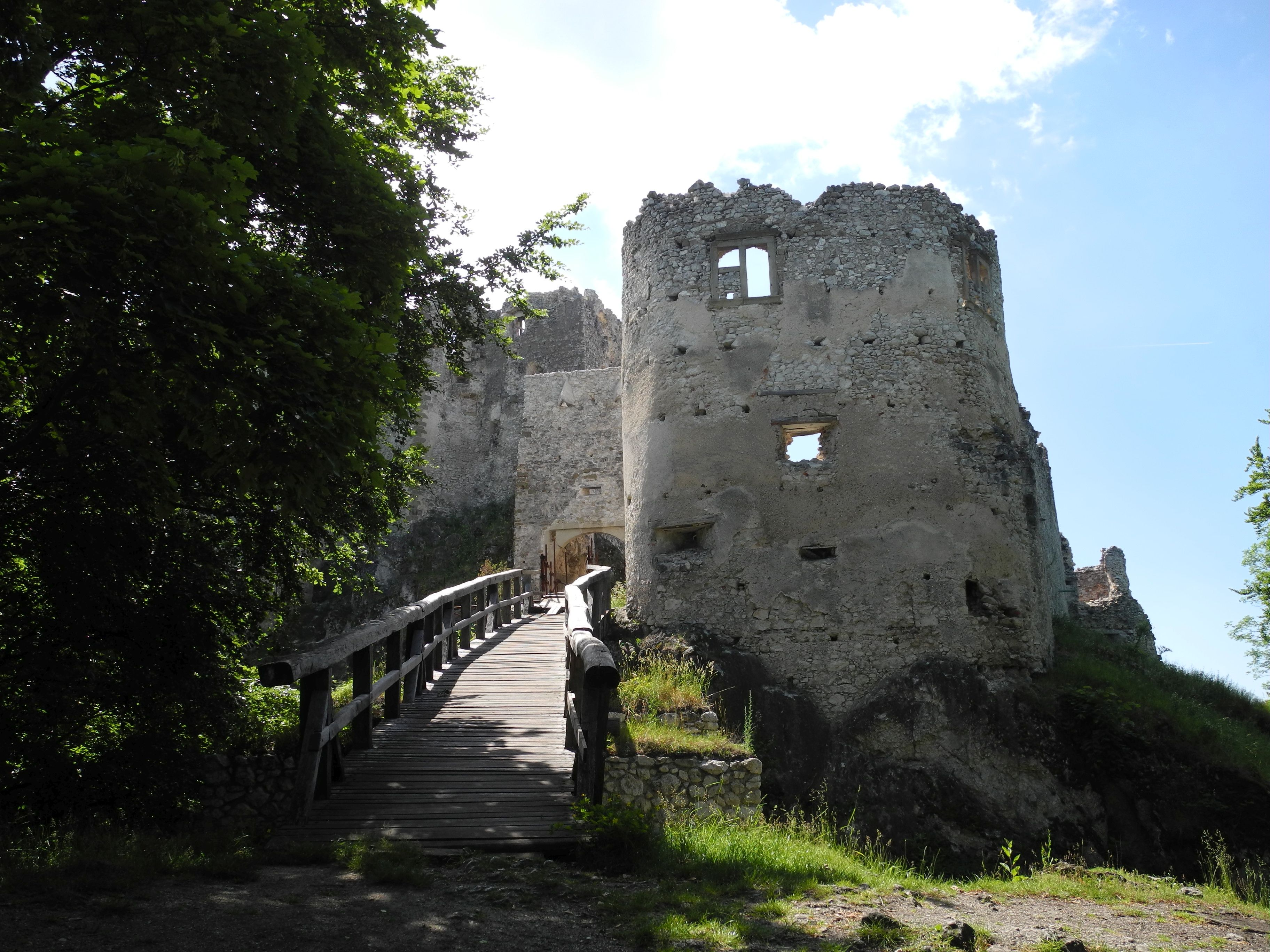 Hrad Uhrovec, Palác hradný